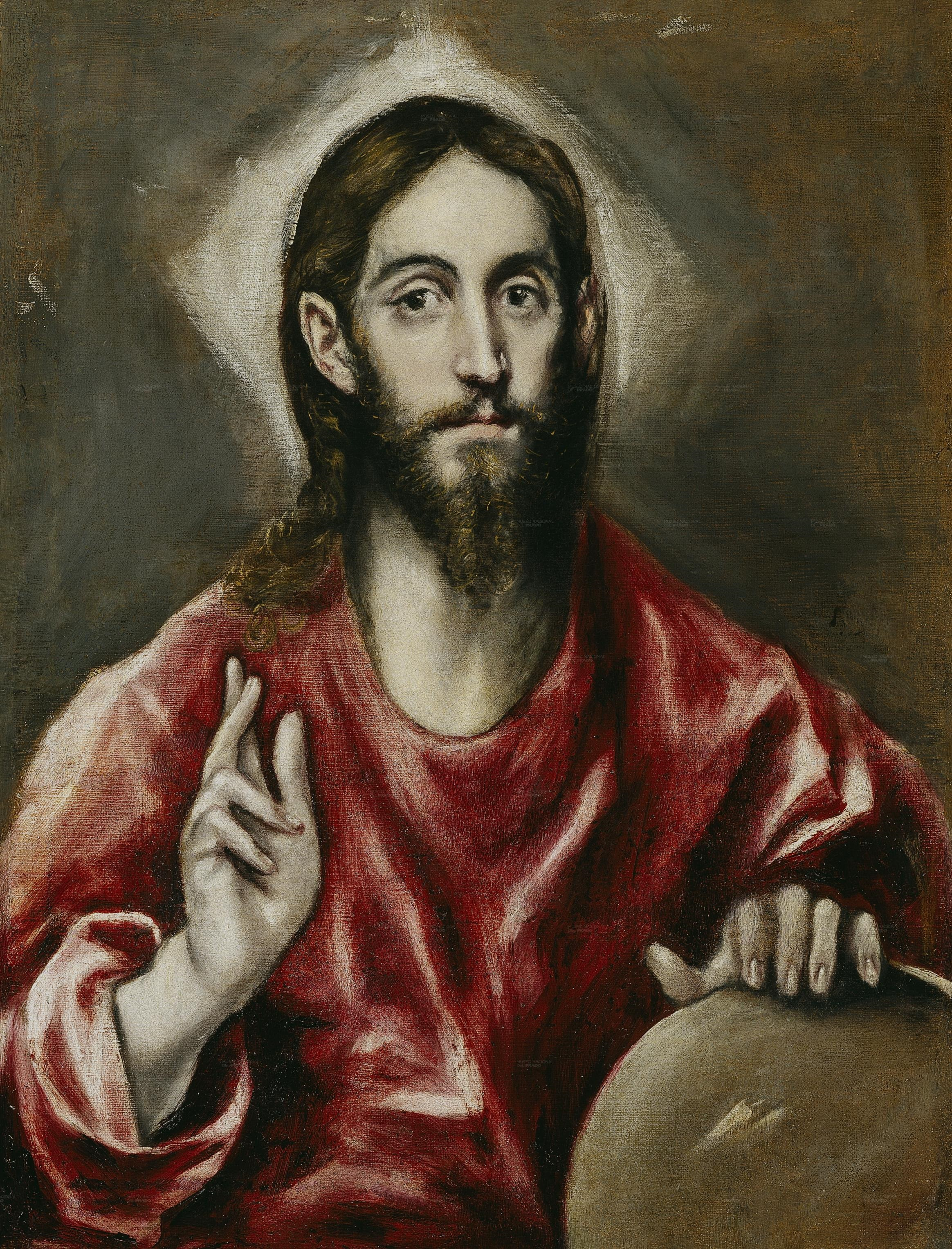 La obra representa a Jesucristo como Salvador del mundo.